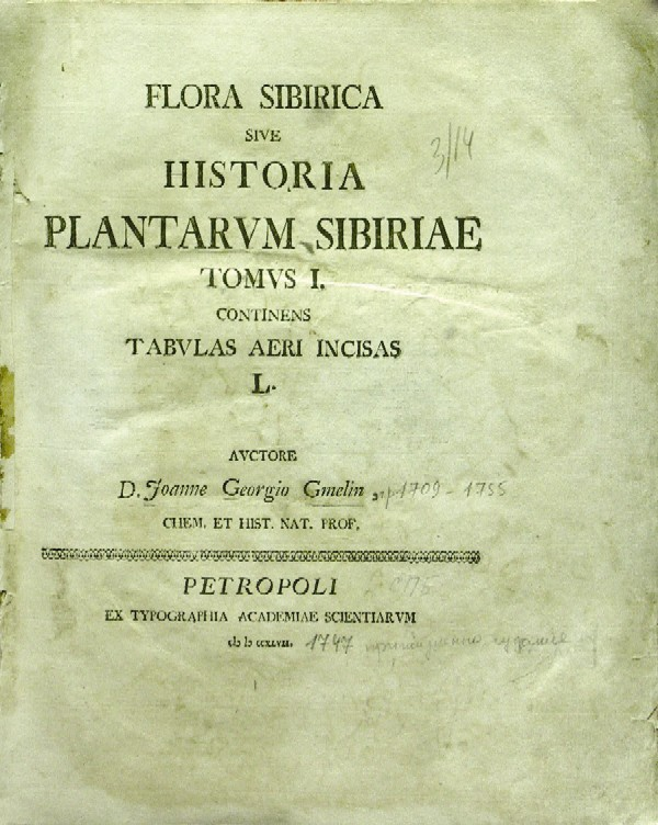 Титульный лист первого тома Flora_sibirica